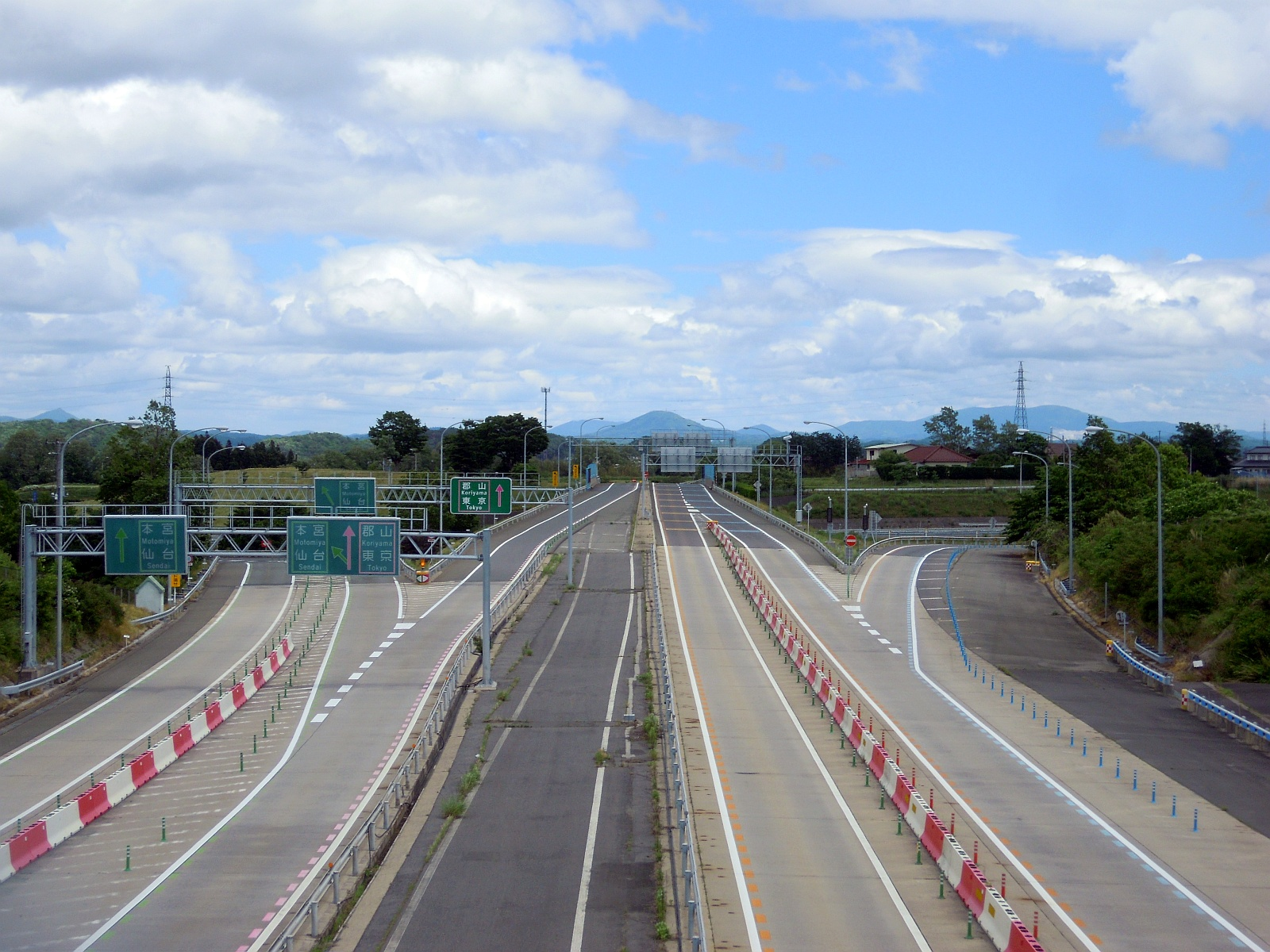 福島県郡山市にある東北自動車道と磐越自動車道が交差する郡山ジャンクション。磐越道方面から東北道のオンオフランプ側に向けて。 左からCランプ（磐越道→東北道下り線オンランプ。カラーリングは緑）、Aランプ（磐越道→東北道上り線オンランプ。カラーリングは桃）、Bランプ（東北道上り線オフランプ→磐越道。カラーリングは橙と水色）、Dランプ（東北道下り線オフランプ→磐越道。カラーリングは水色）。